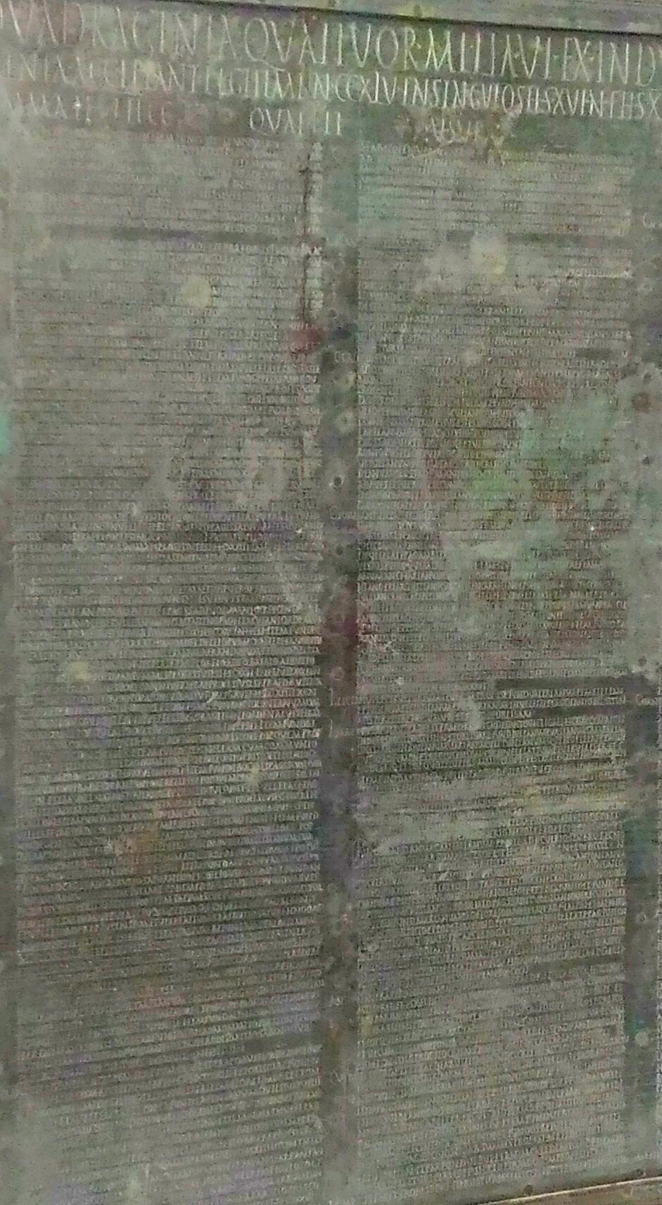 Tabula alimentaire triaianea